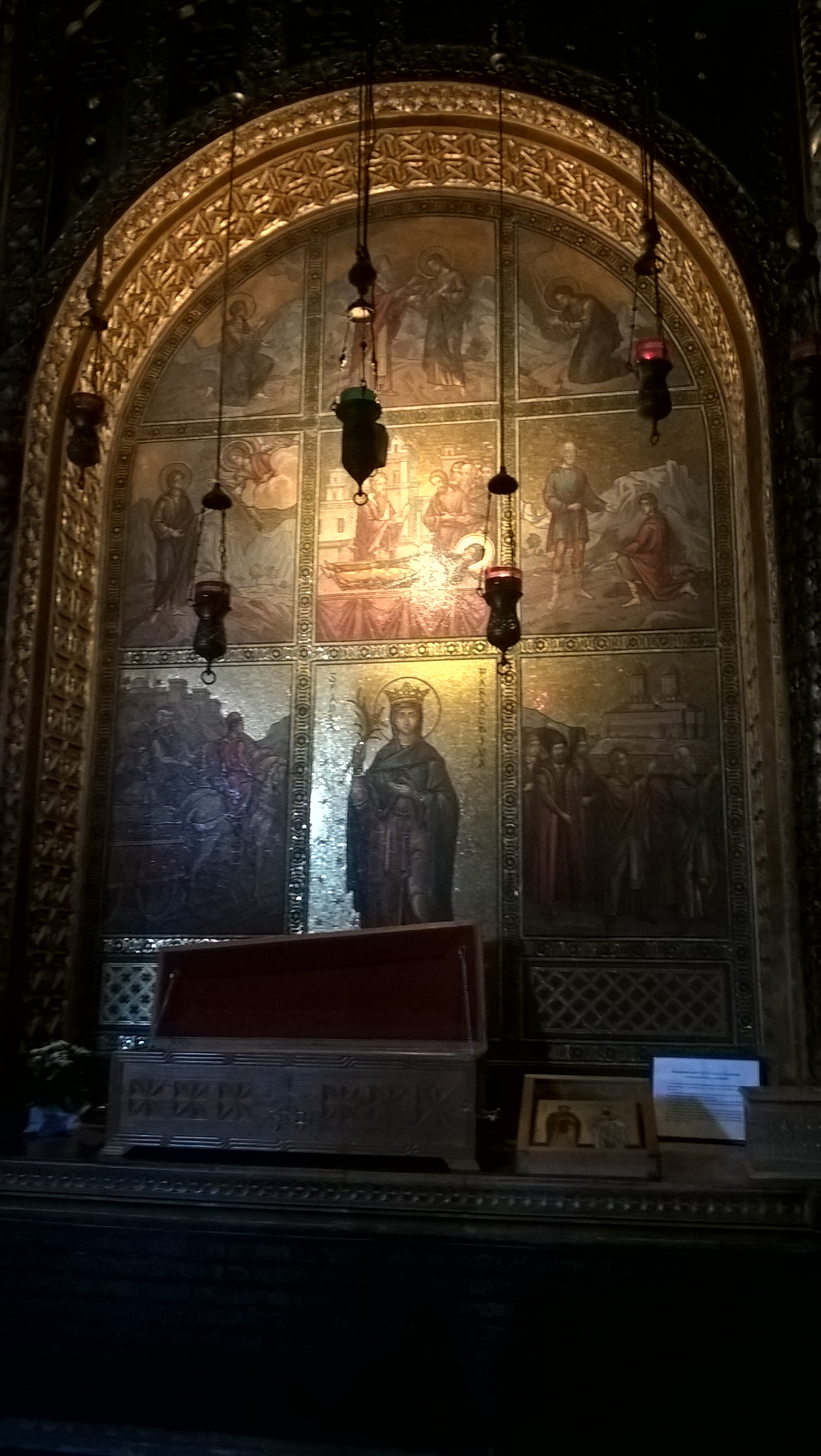 Cerkiew Trzech Świętych Hierarchów w Jassach - miejsce po relikwiach św. Paraskiewy